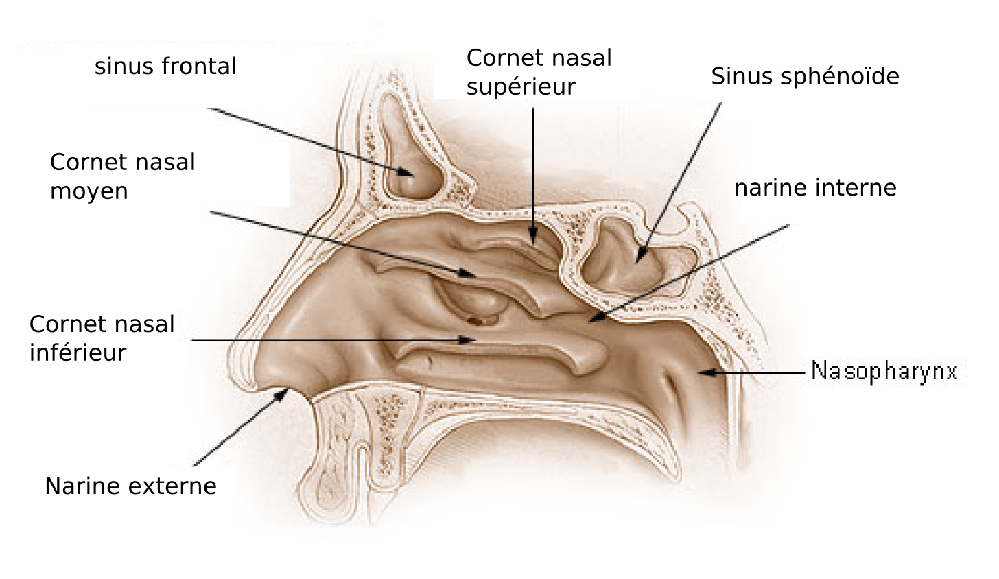 Nasal cavities